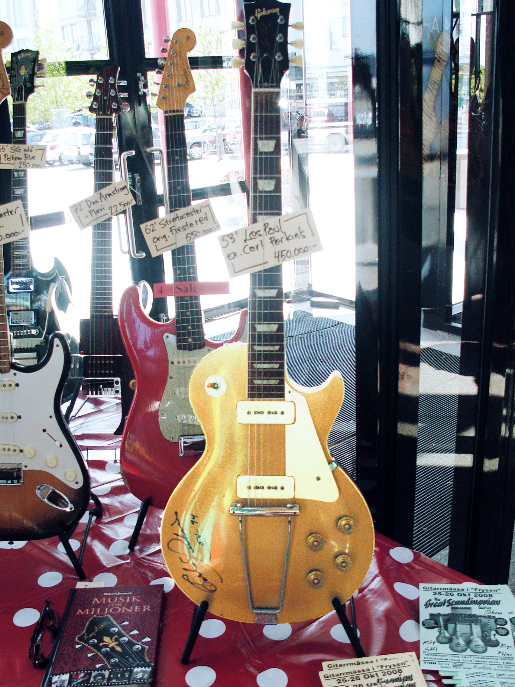 53' Les Paul Expensive...